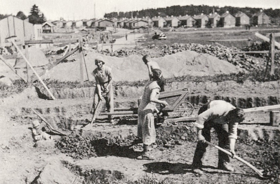 Norra Ängby byggs ca 1935, Bromma/Stockholm